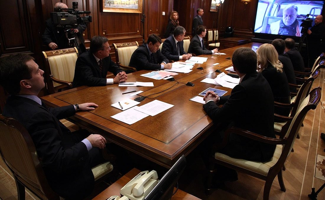 Президент провёл совещание по вопросам ликвидации последствий катастрофы «Невского экспресса»